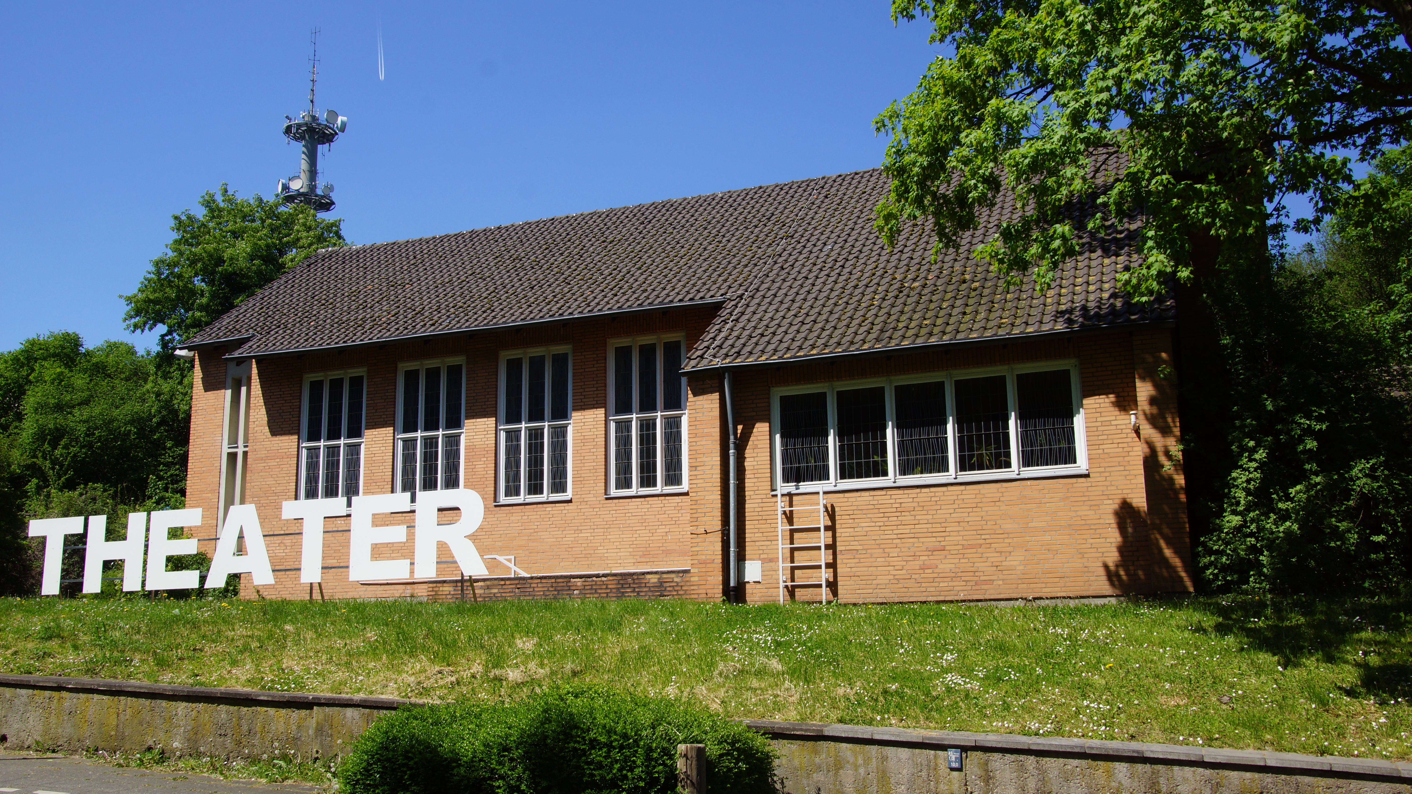 Haus am Bahndamm in Frechen, Rosmarstraße 113